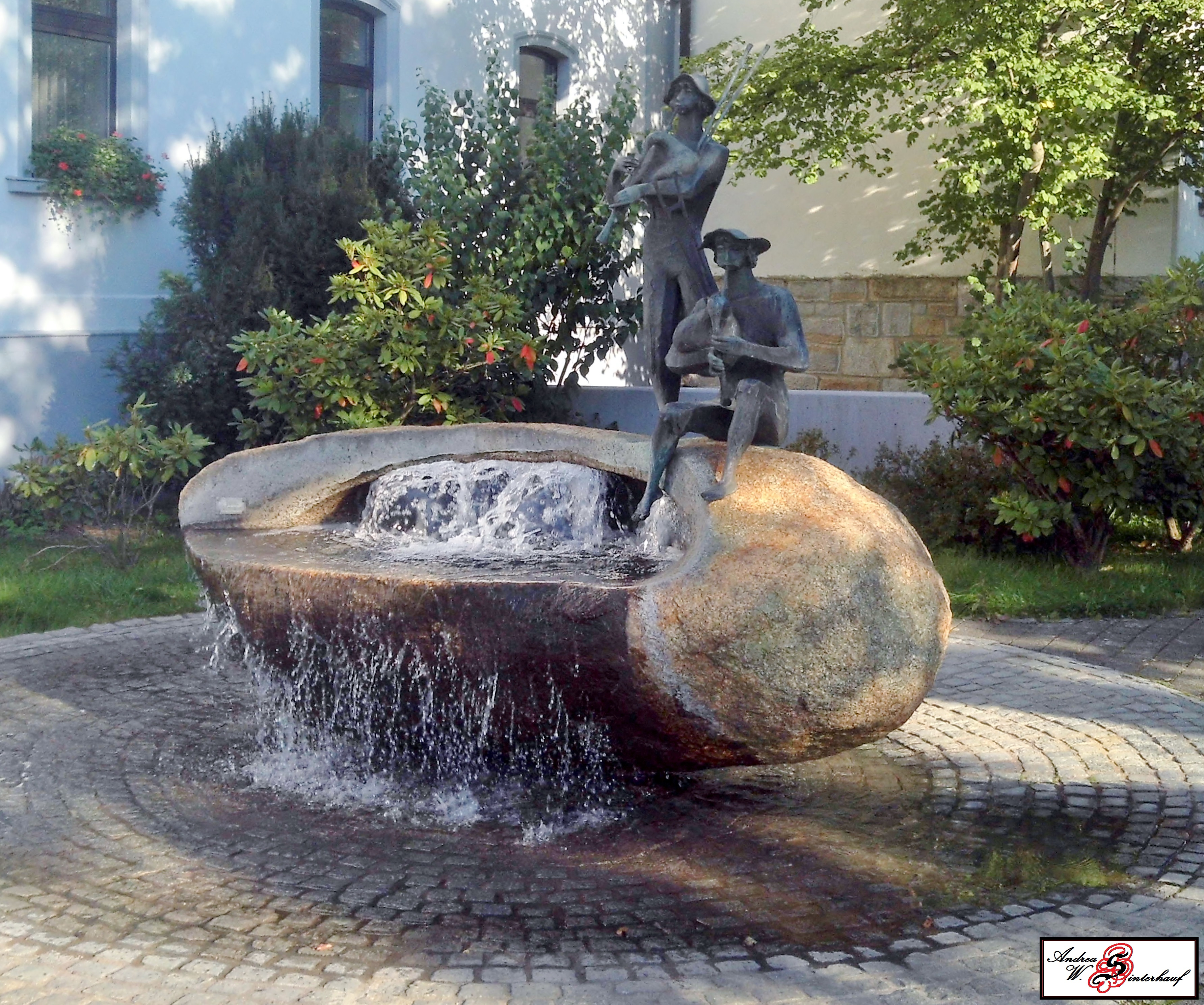 Bockpfeifer-Brunnen